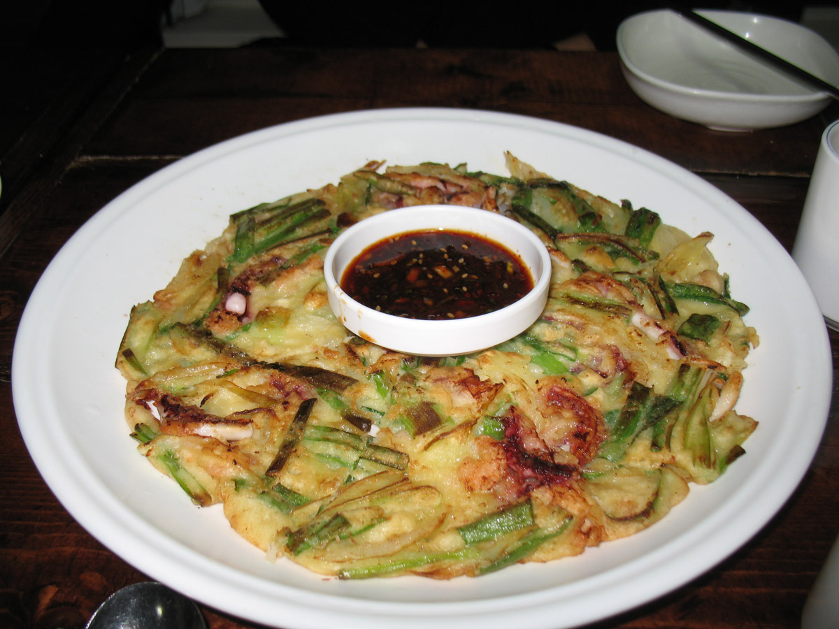 Pajeon